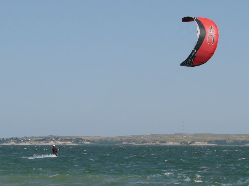 kite surfing